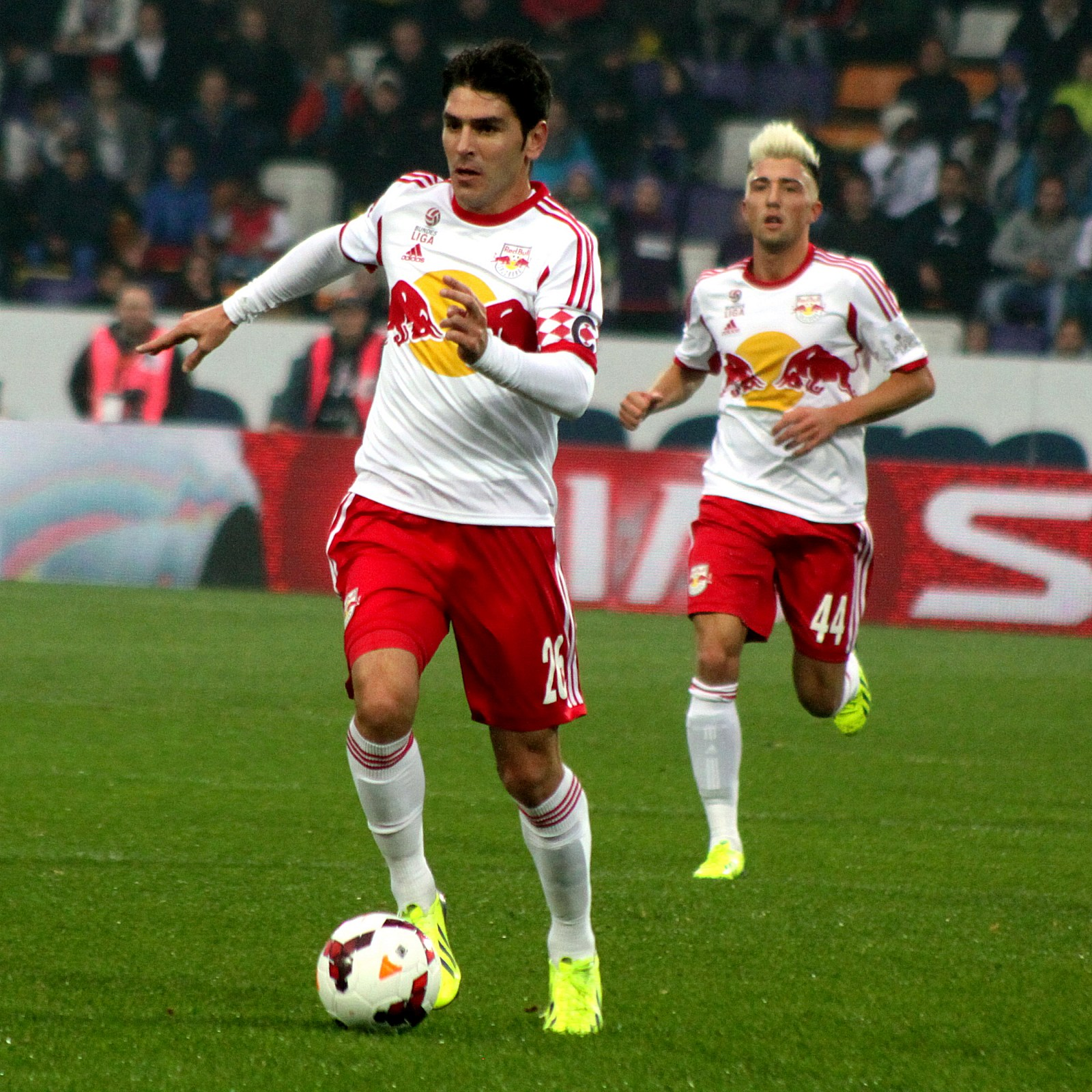 Meisterschaftsspiel der österreichischen Bundesliga: FK Austria Wien gegen FC Red Bull Salzburg (0:0) am 6. Oktober 2013 in Wiener Generali Arena. - Das Foto zeigt Jonathan Soriano (links) und Kevin Kampl (beide FC Red Bull Salzburg).